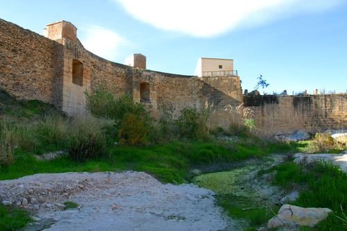 Assut de Mutxamel